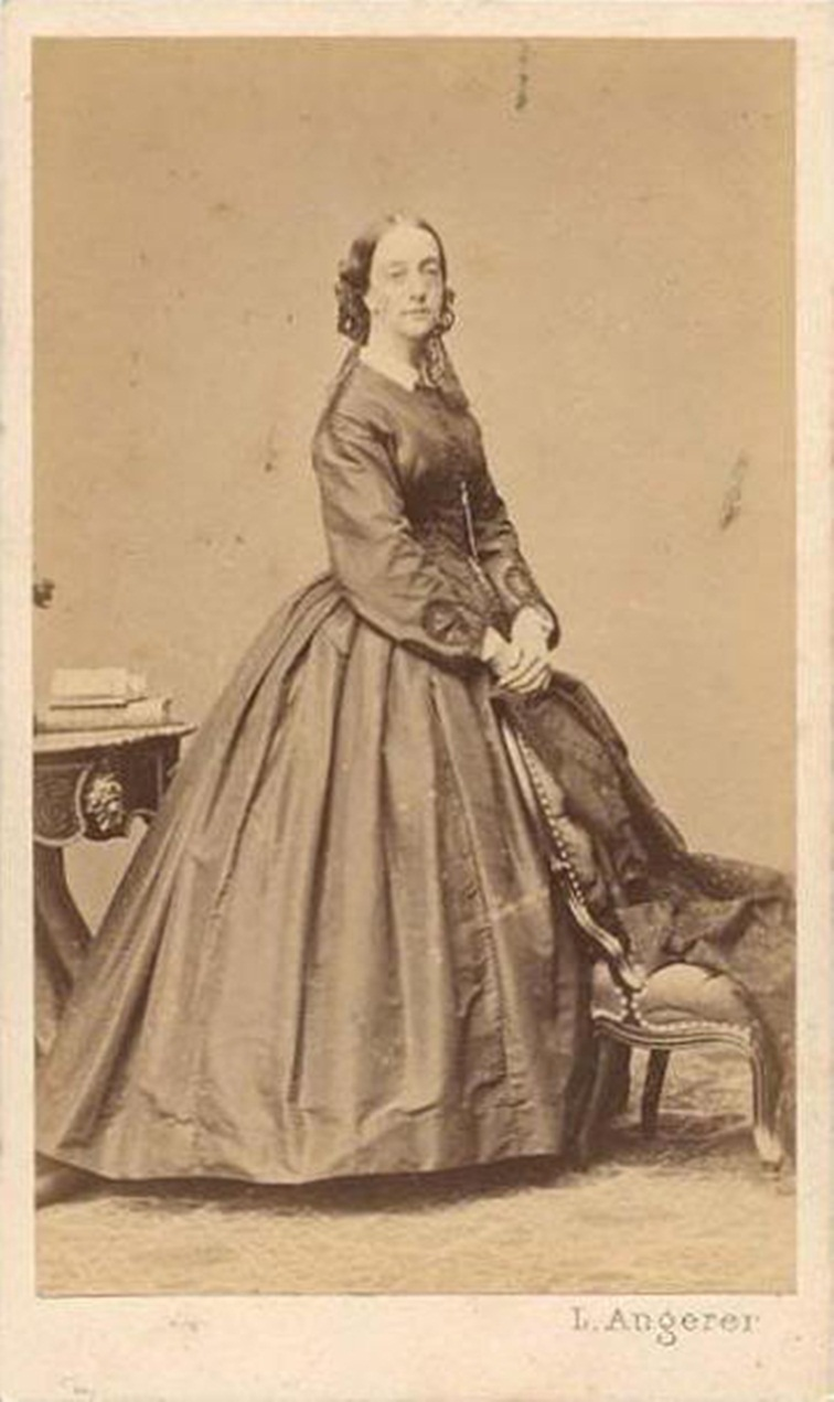 Franziska Caroline von Portugal aka Francisca de Bragança aka Françoise de Joinville (1824–1898)